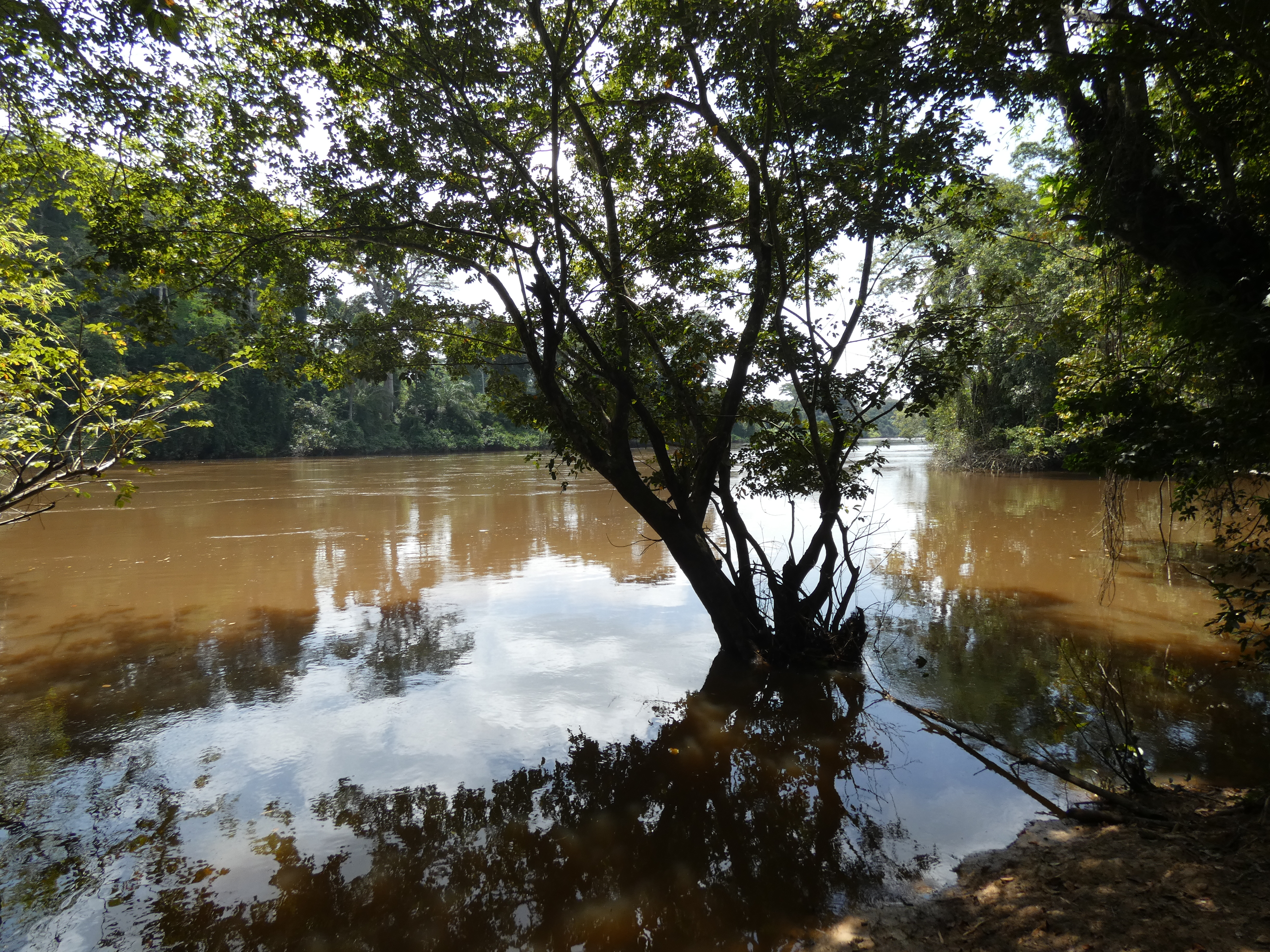 Der Cavally beim Ort Tai vom ivoirschen Ufer. Am gegenüberliegenden Ufer Liberia.